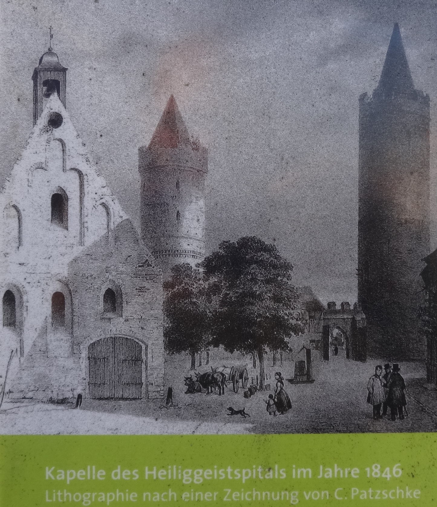 Auf dem heutigen Heilig-Geist-Platz befand sich bis zum Ende des 19. Jahrhunderts die Heilig-Geist-Kapelle aus dem 12. Jahrhundert. Heute prägt eine Luthereiche sowie ein Gedenkstein für einen Pastor den Platz.